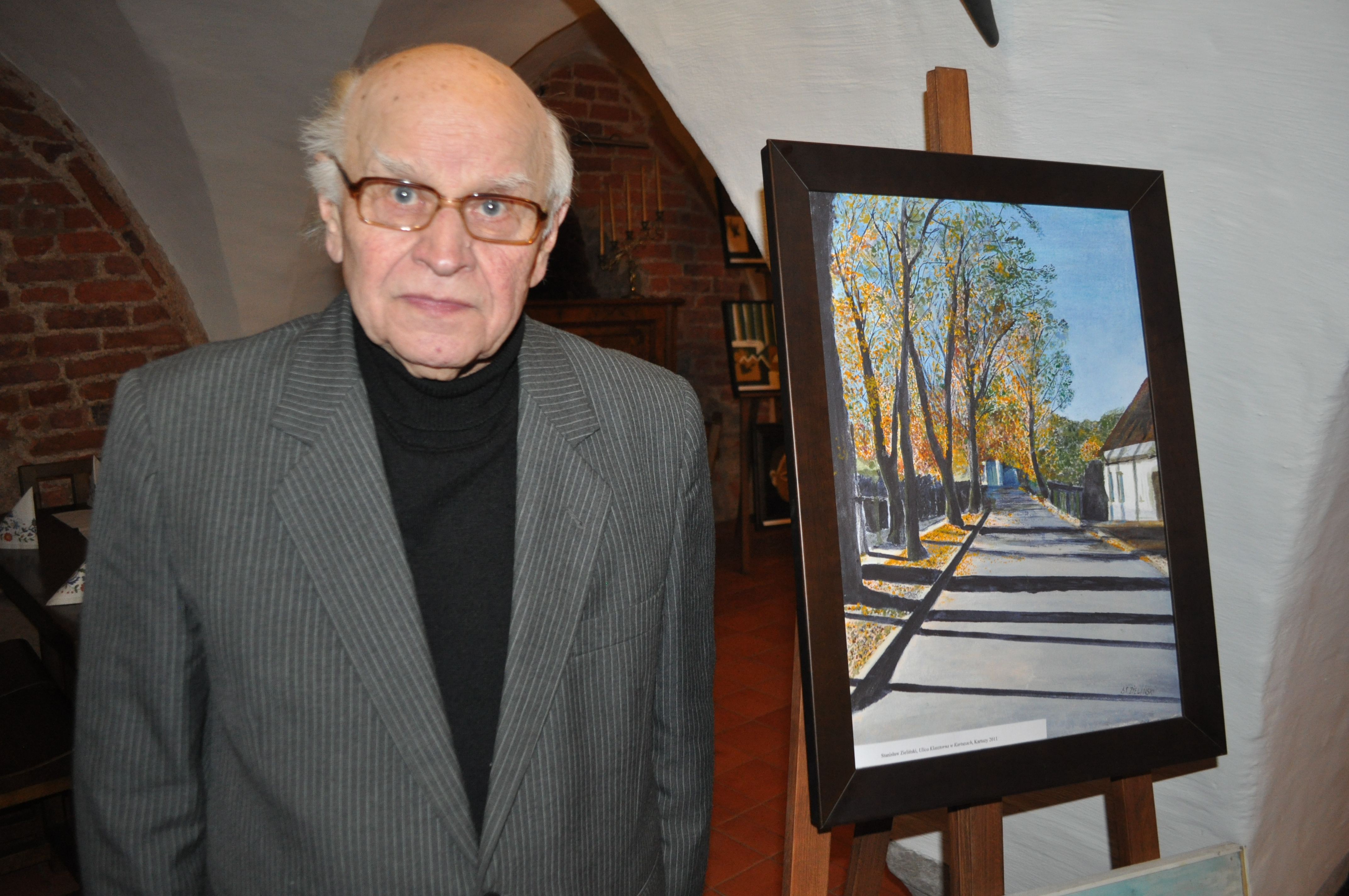 Stanisław Zieliński. Fot. Piotr Smoliński